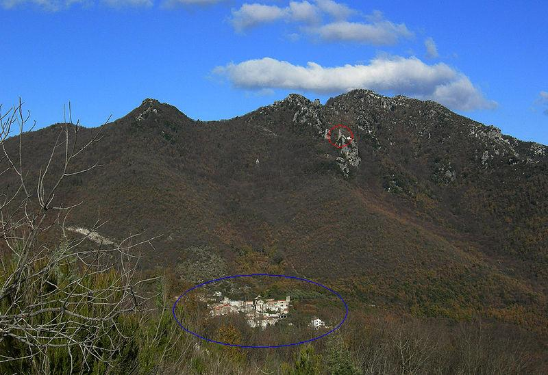 Vista del Monte Maggiore (CE) con evidenziamenti al Santuario del Santo Salvatore e alla cittadina di Croce(Rocchetta e Croce CE). Napulitano: Veruta du Mont Maggior (Casert) cu evidenziament o' Santuar do'Sant Salvator e a u paesiegl e Croc (Rucchet e Croc Casert)